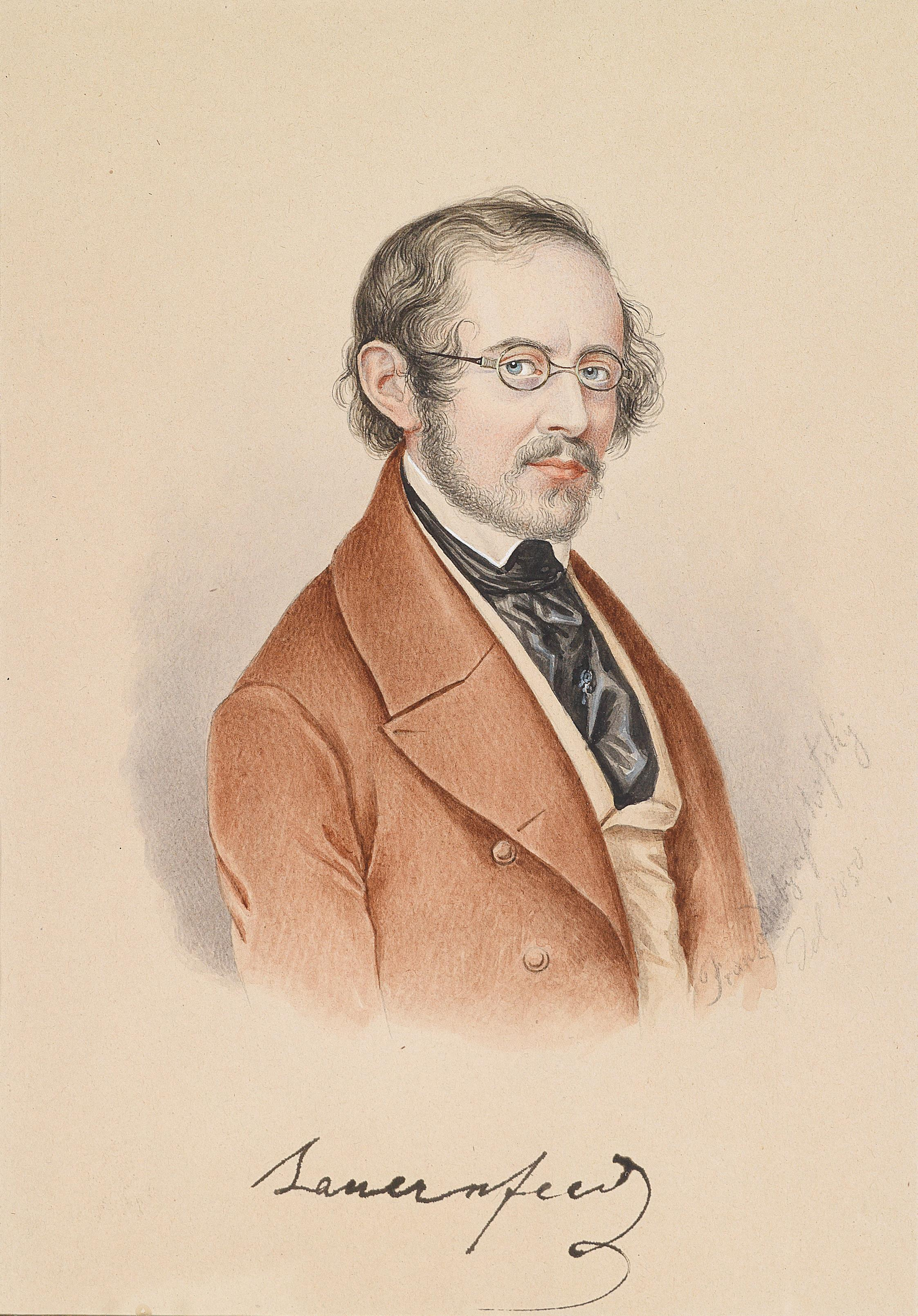 Porträt des Dramatikers Eduard von Bauernfeld (1802-1890)